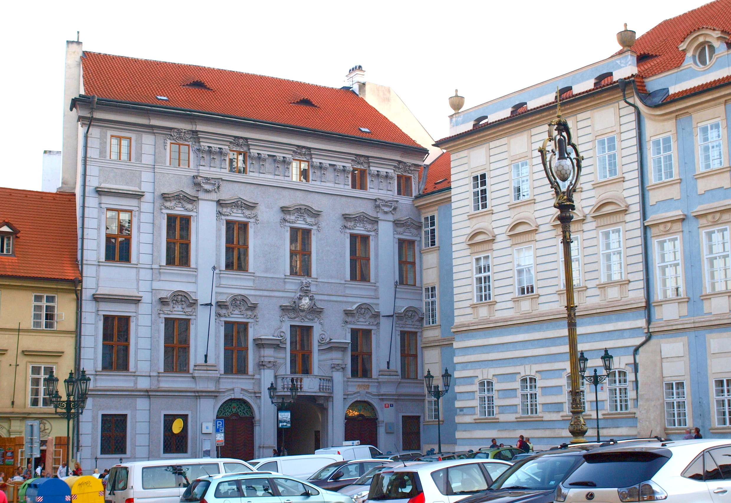 Lichtenštejnský palác na Malostranském náměstí